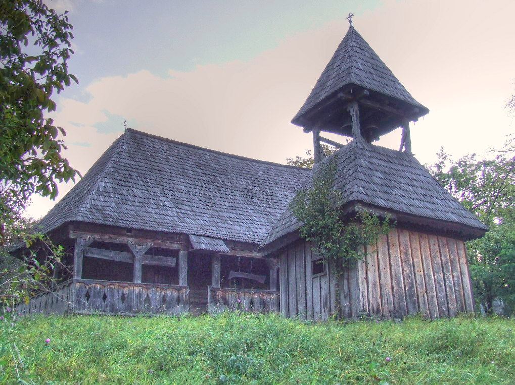 Biserica de lemn din Băiţa, judeţul Mureş. Vedere din sud.